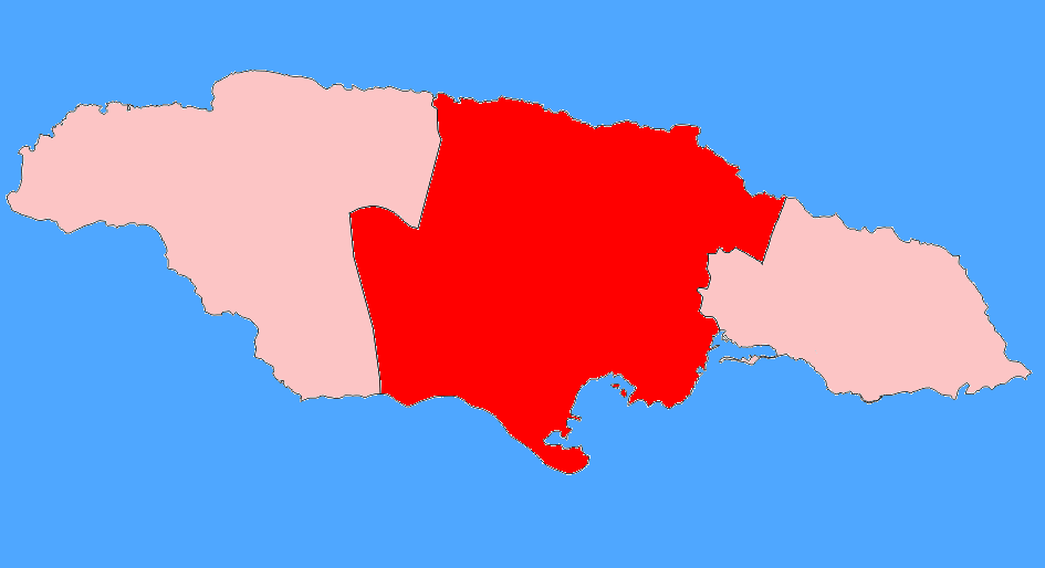 Mapa del condado de Middlesex.